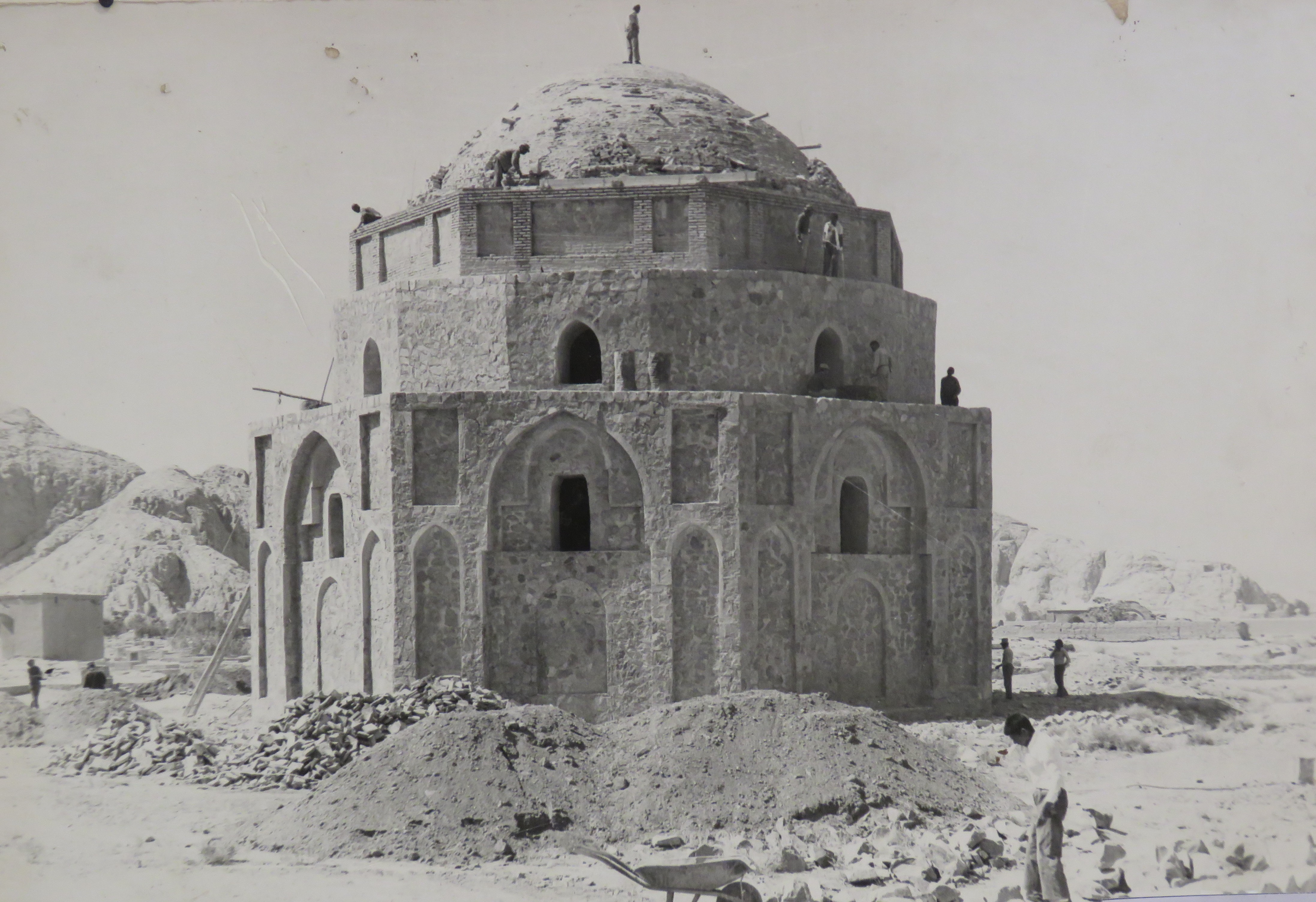 گنبد گبری